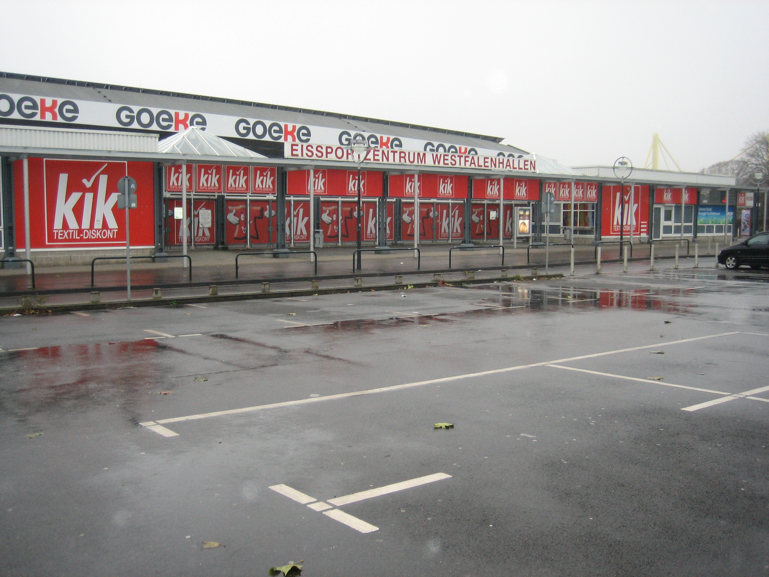 Besuchereingang des Eissportzentrums Westfalenhallen